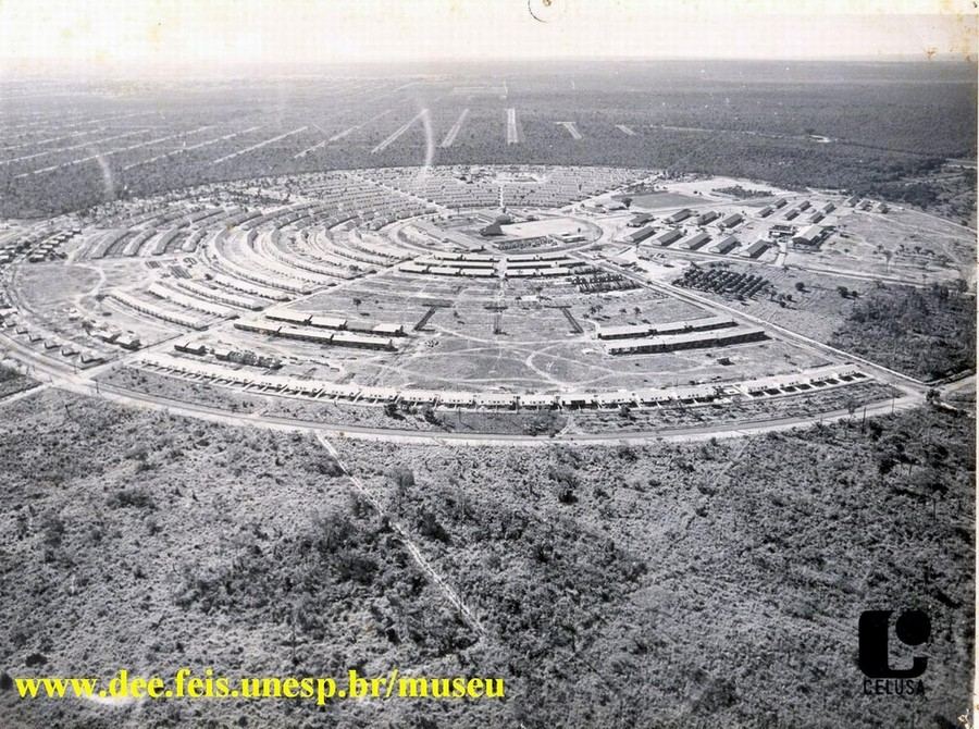 Vila Piloto - histórica